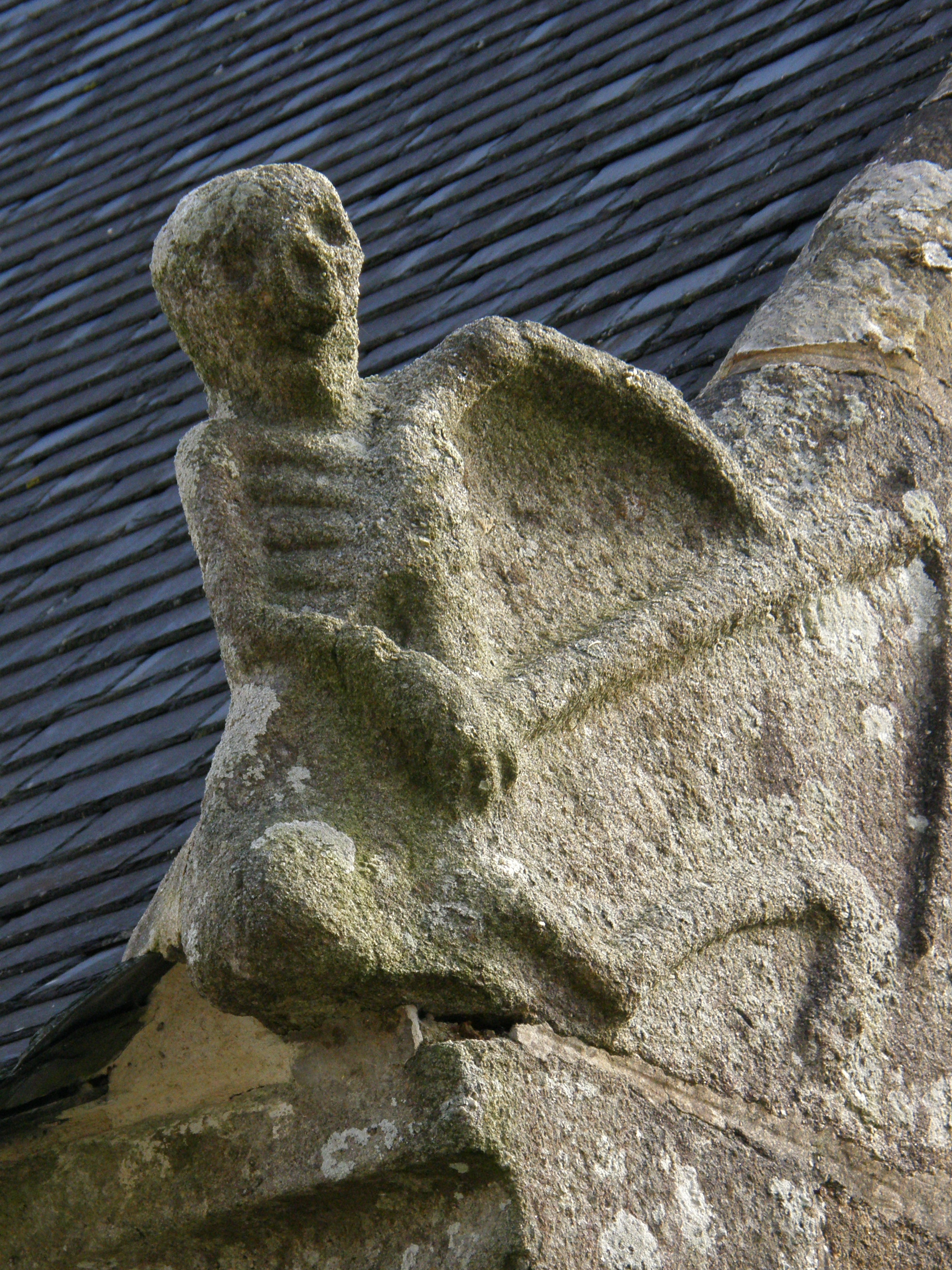 L'Ankou sur le pignon de l'ossuaire de BRASPARTS.